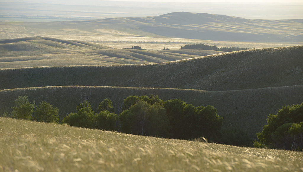 Участок «Буртинская степь» Оренбургского заповедника